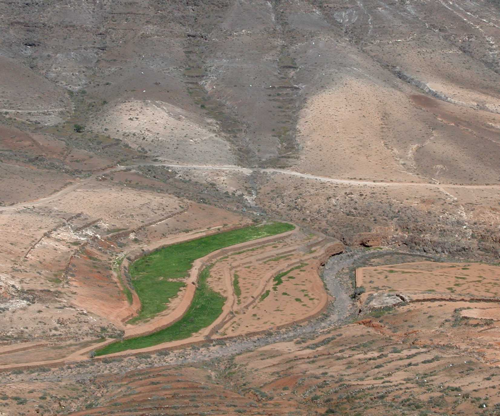 Gavias de fondo de barranco en Vallebron (Fuerteventura - Canarias - España).